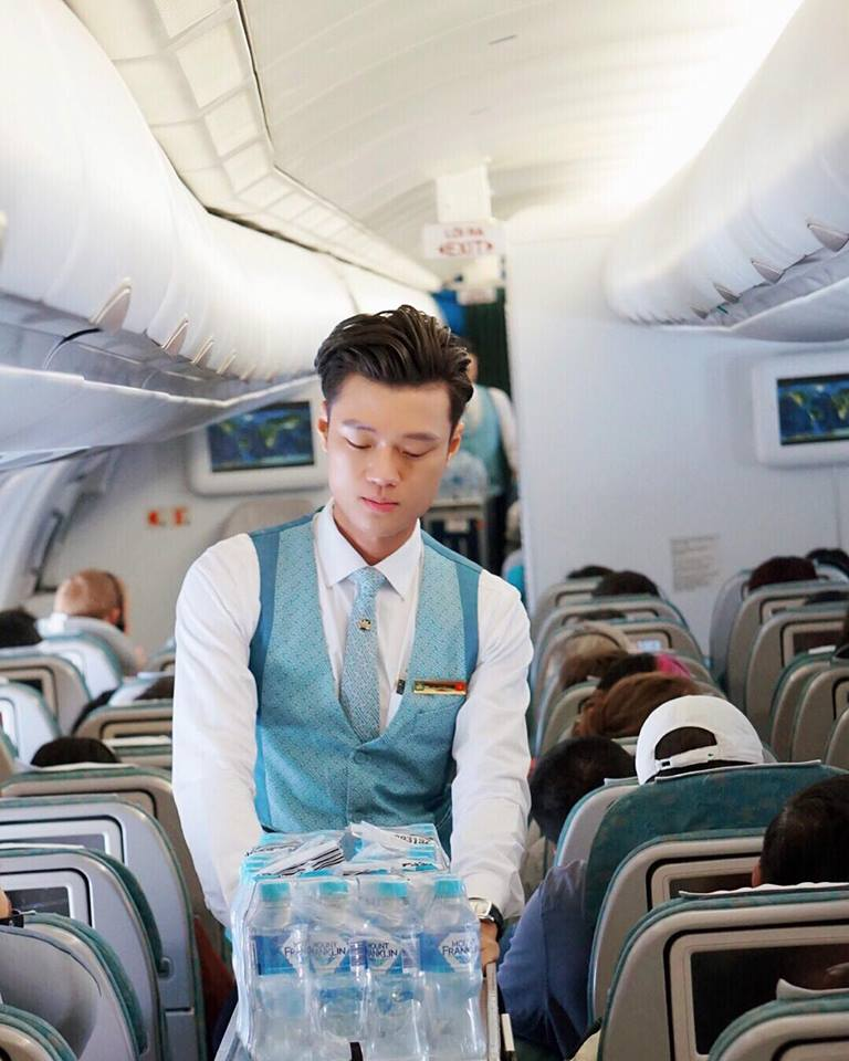 Tiếp viên hàng không Hãng hàng không quốc gia Vietnamairlines